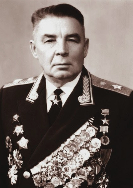 Командующий Воздушно-десантными войсками (1954-1959 гг. и июль 1961 - январь 1979 гг.), генерал армии Маргелов Василий Филиппович